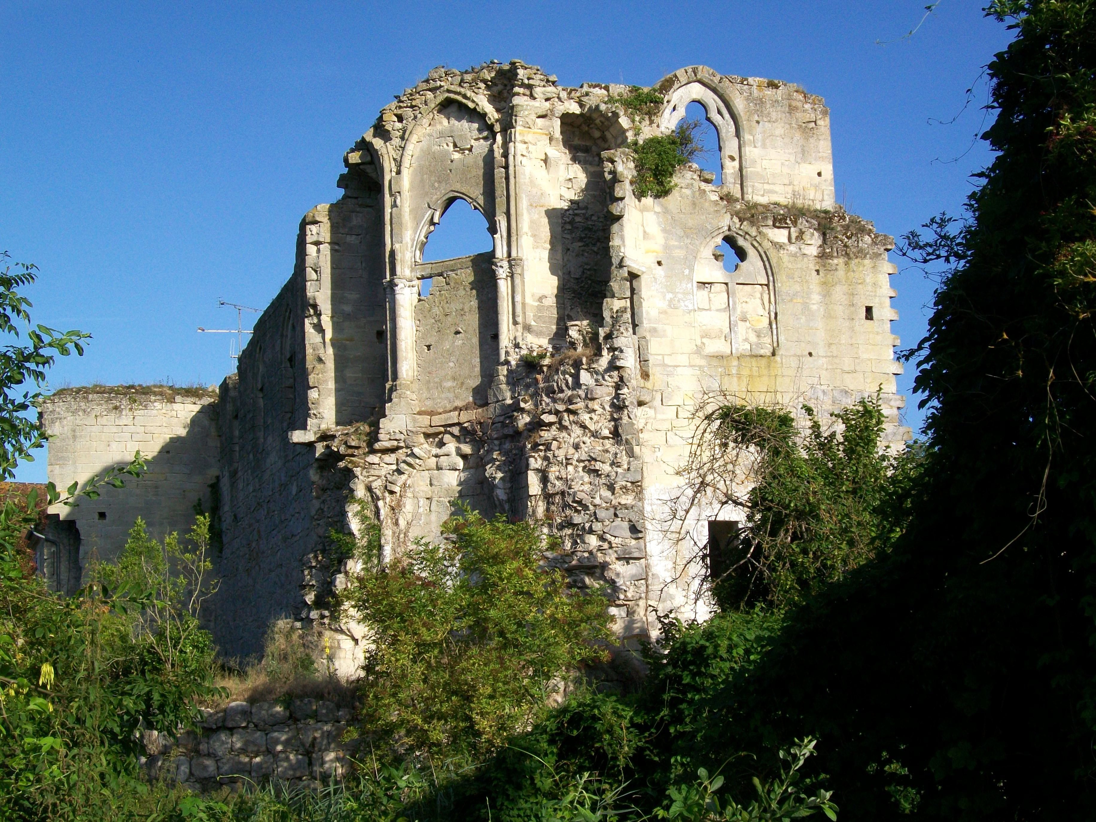 La chapelle de l'ancien château, vue depuis le sud-est.